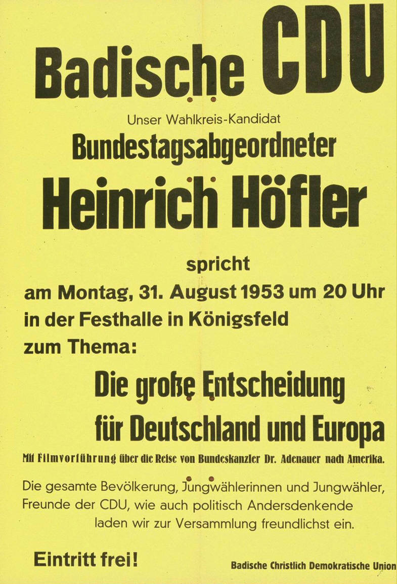 Badische CDU Unser Wahlkreis-Kandidat Bundestagsabgeordneter Heinrich Höfler spricht ... zum Thema: Die große Entscheidung für Deutschland und Europa Mit Filmvorführung über die Reise von Bundeskanzler Dr. Adenauer nach Amerika. ... Plakatart: Ankündigungsplakat Auftraggeber: Badische Christlich Demokratische Union Drucker_Druckart_Druckort: Plakatdruck Artur Kratzer, Donaueschingen Objekt-Signatur: 10-001: 561 Bestand: Plakate zu Bundestagswahlen (10-001) GliederungBestand10-18: Plakate zu Bundestagswahlen (10-001) » Die 2. Bundestagswahl am 6. September 1953 » CDU » Ankündigungsplakate Lizenz: KAS/ACDP 10-001: 561 CC-BY-SA 3.0 DE